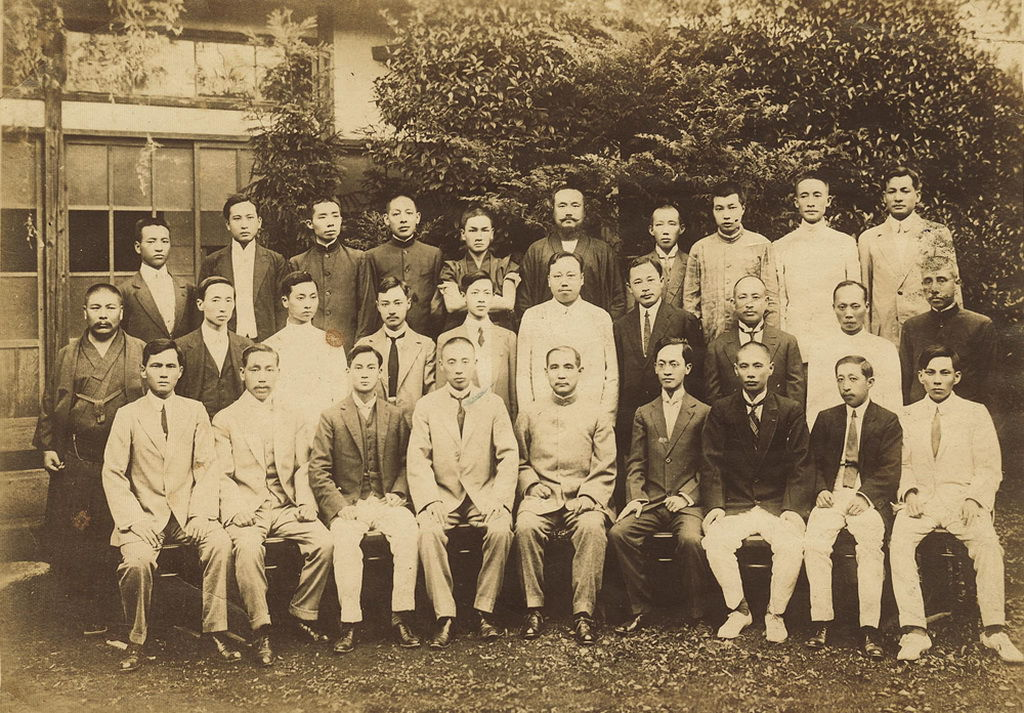 1915年9月25日，孙中山与即将回国举行反袁革命的同志合影于东京民国社。前排右起：田桐、廖仲恺、居正、胡汉民、孙中山、陈其美、许崇智、郑鹤年、邓铿。第二排右起：第七人为宁武。第二排左起第一人为日本人萱野长知、左起第八人为谢持。后排左5戴季陶。